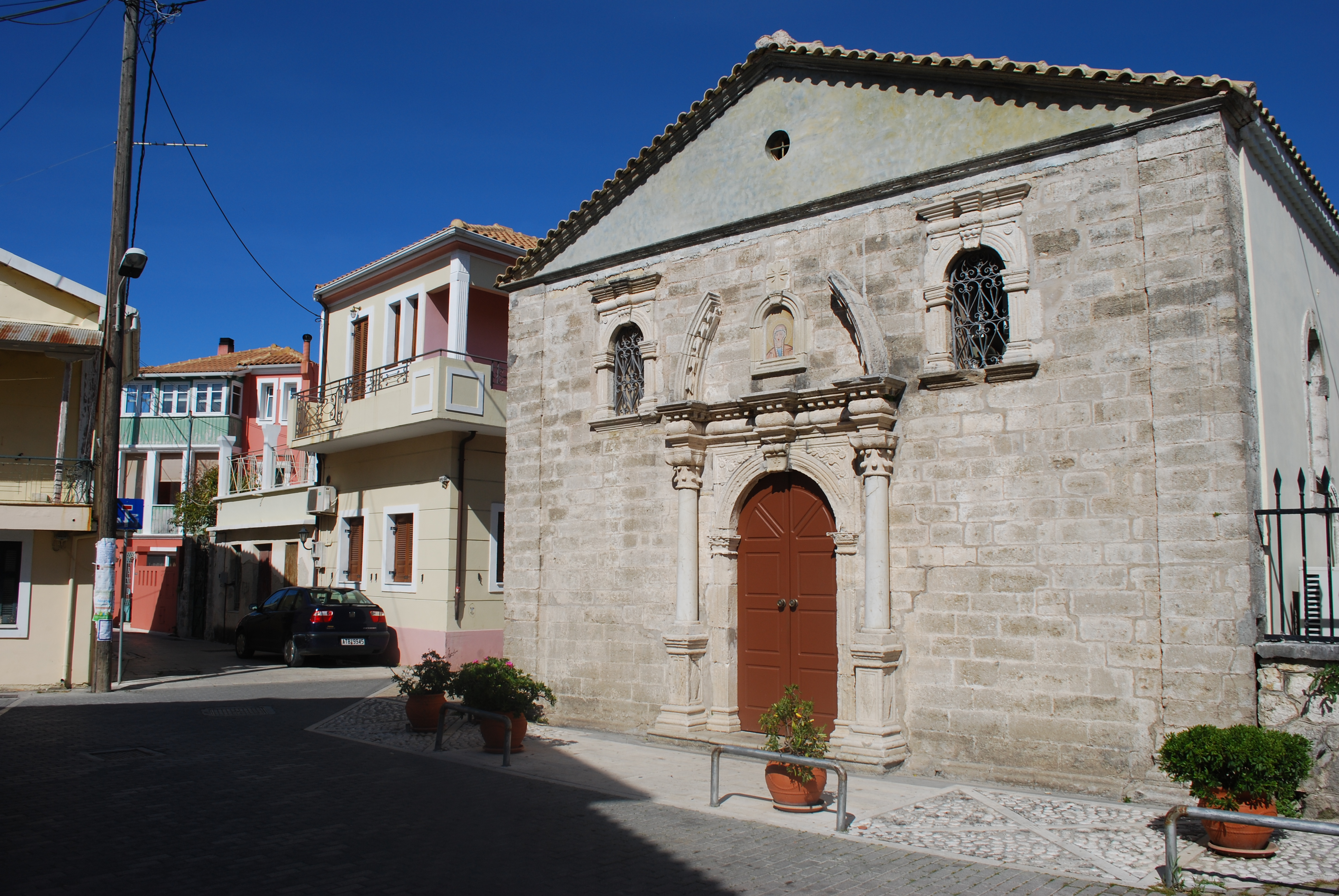 Vue de Lefkada.